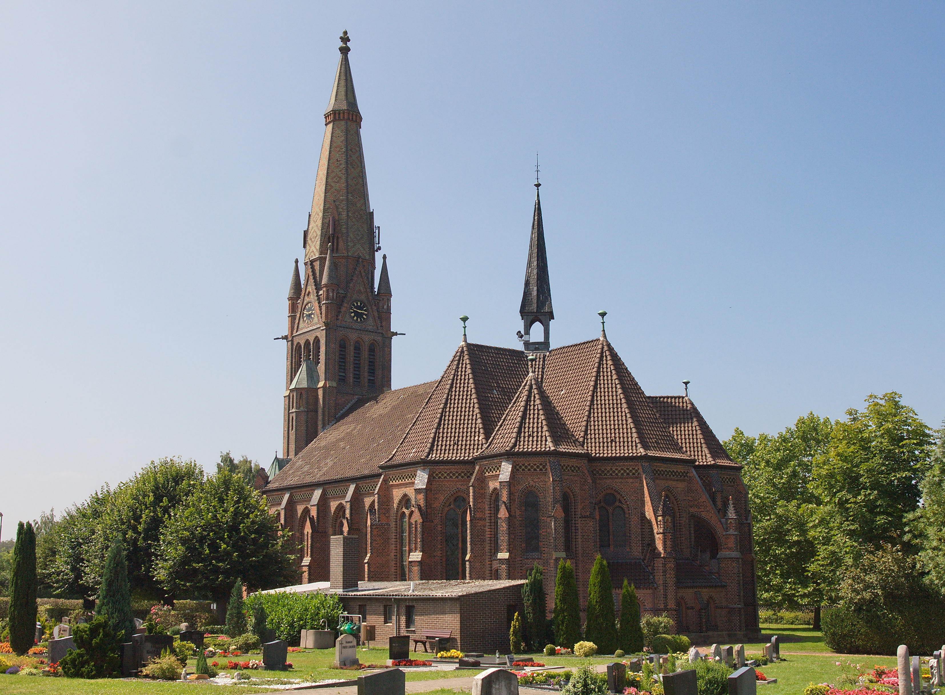 St. Nicolai Kirche in Altenhagen-Hagenburg (1868-1871 durch Carl Wilhelm Hase), Niedersachsen, Deutschland